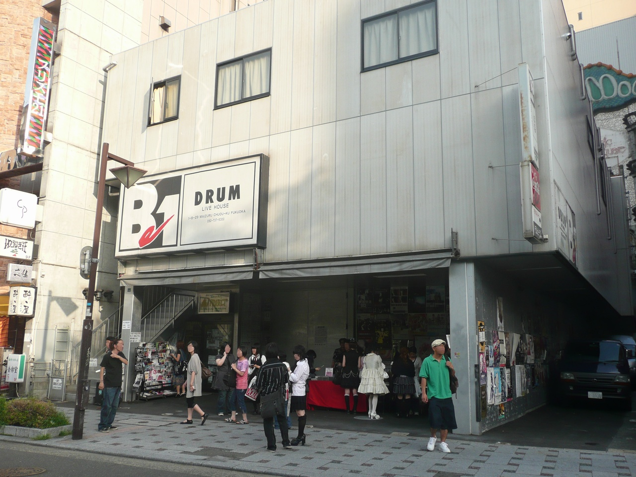 2007/9/6 ALI PROJECTのライブツアー『暗黒サイケデリック』の福岡公演（ライブハウス『DRUM Be-1』）に集まる人々。 ライブハウスとALI PROJECT用の画像。撮影後人物とナンバープレートにぼかしの処理を加えた。 撮影&投稿者:Sanjo